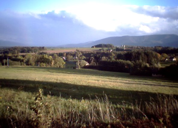 Vělopolí, Frýdek-Místek District, Czech Republic